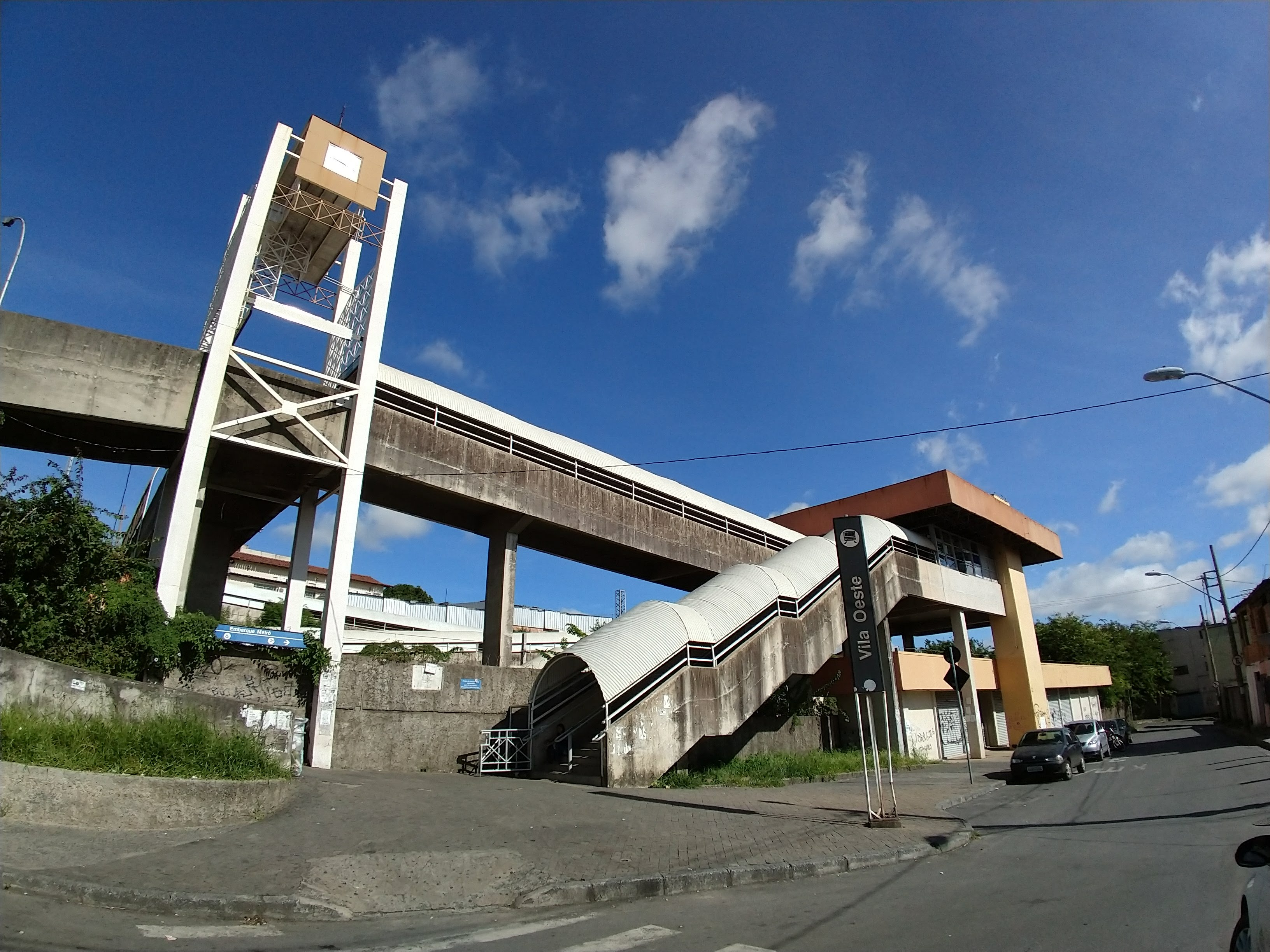 Estação Vila Oeste, em Belo Horizonte, Minas Gerais.